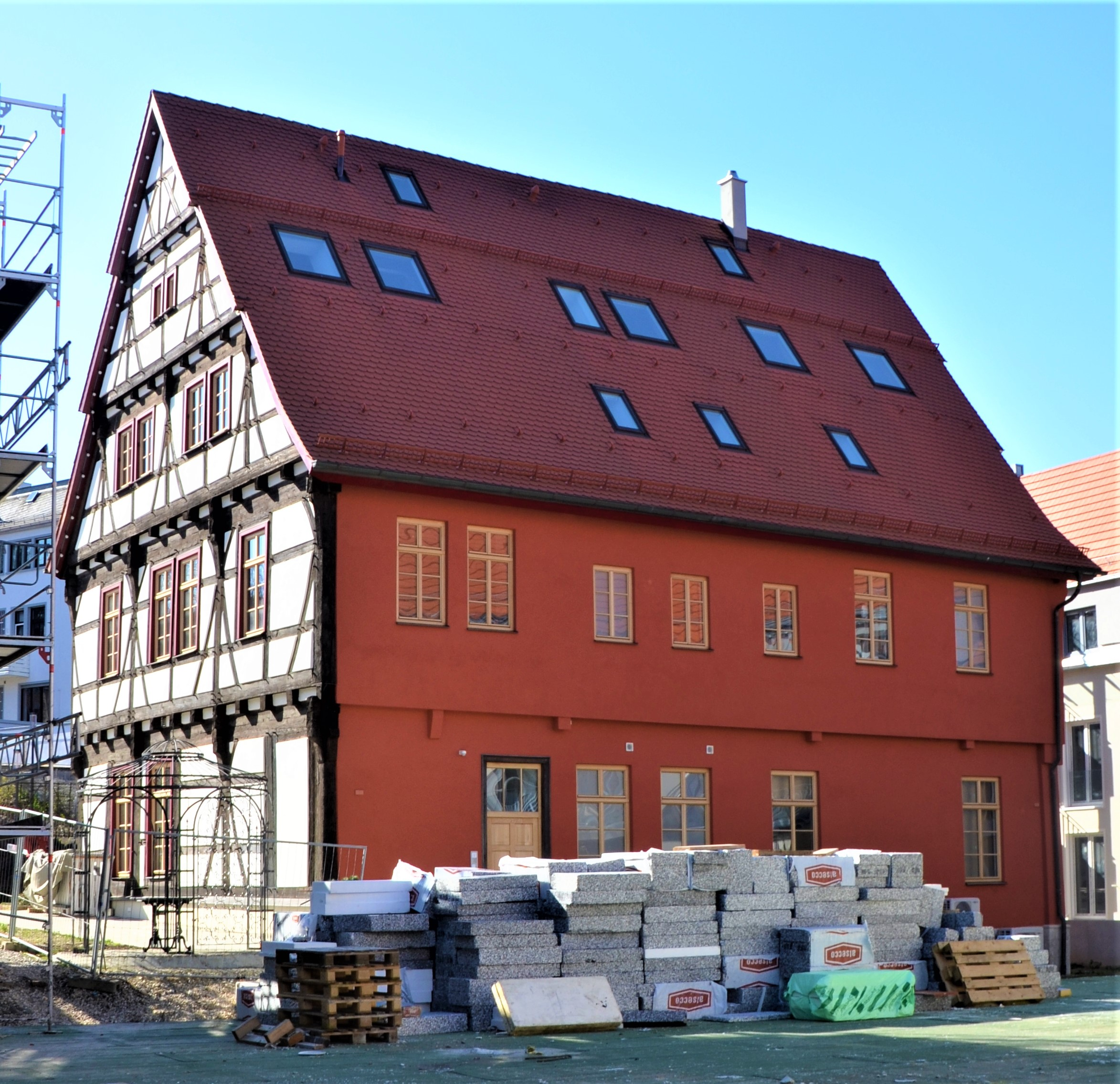 Rechbergsche Scheuer von Norden aufegenommen im März 2020, Gerüst von der Bautätigkeit auf dem ehem. Deyhle-Areal